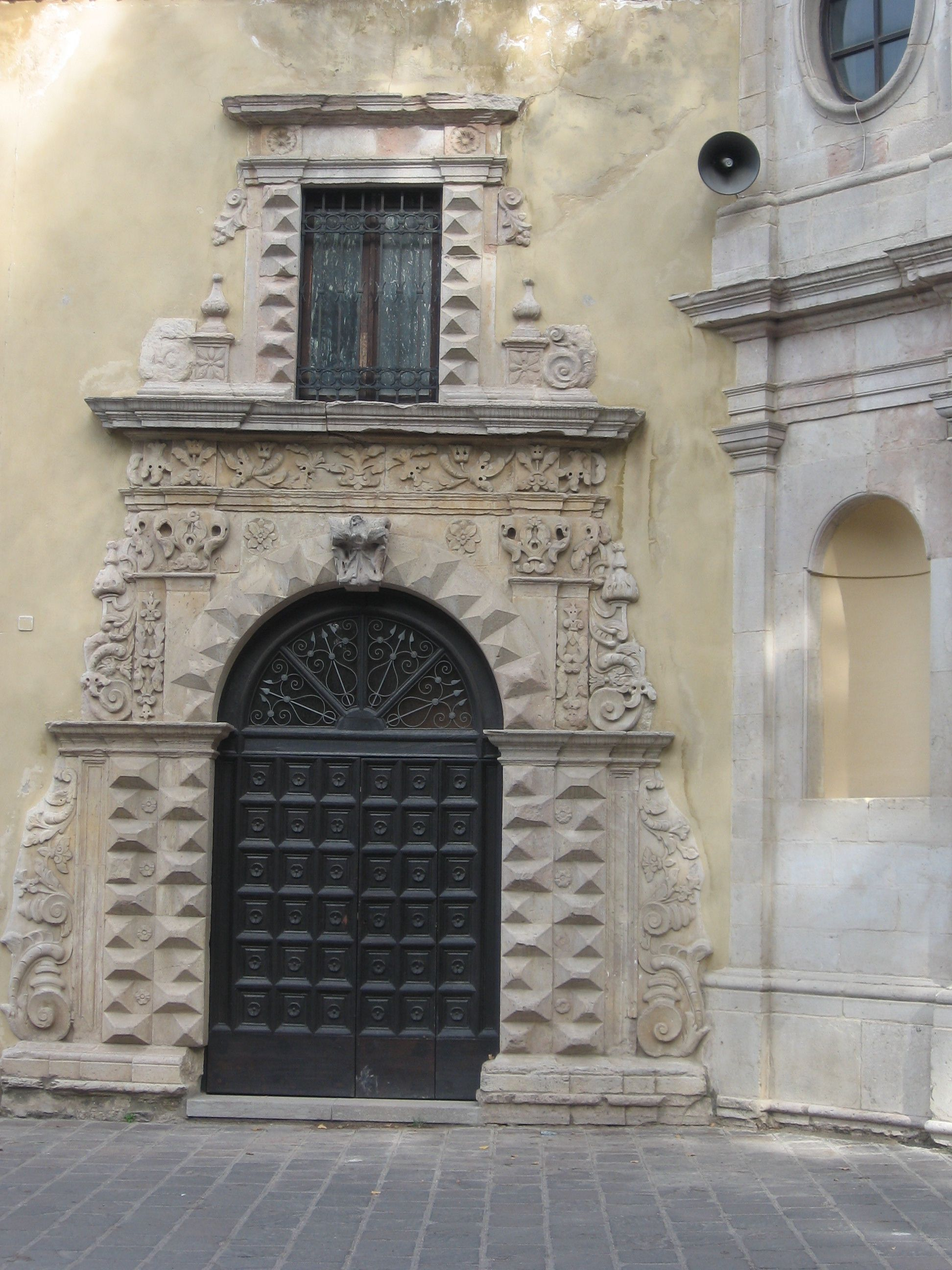 Entrata del monastero